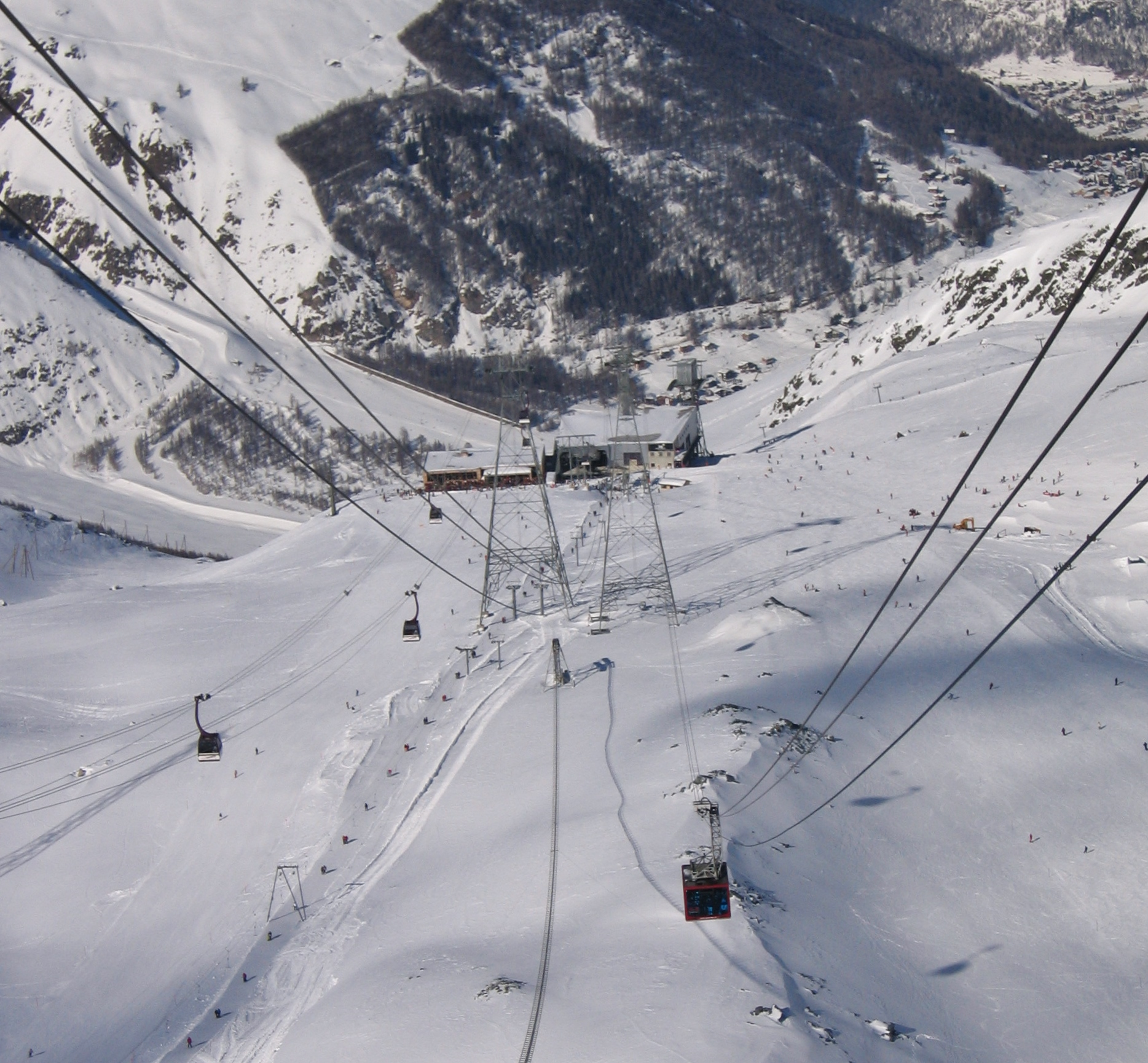 Gondel Allalin